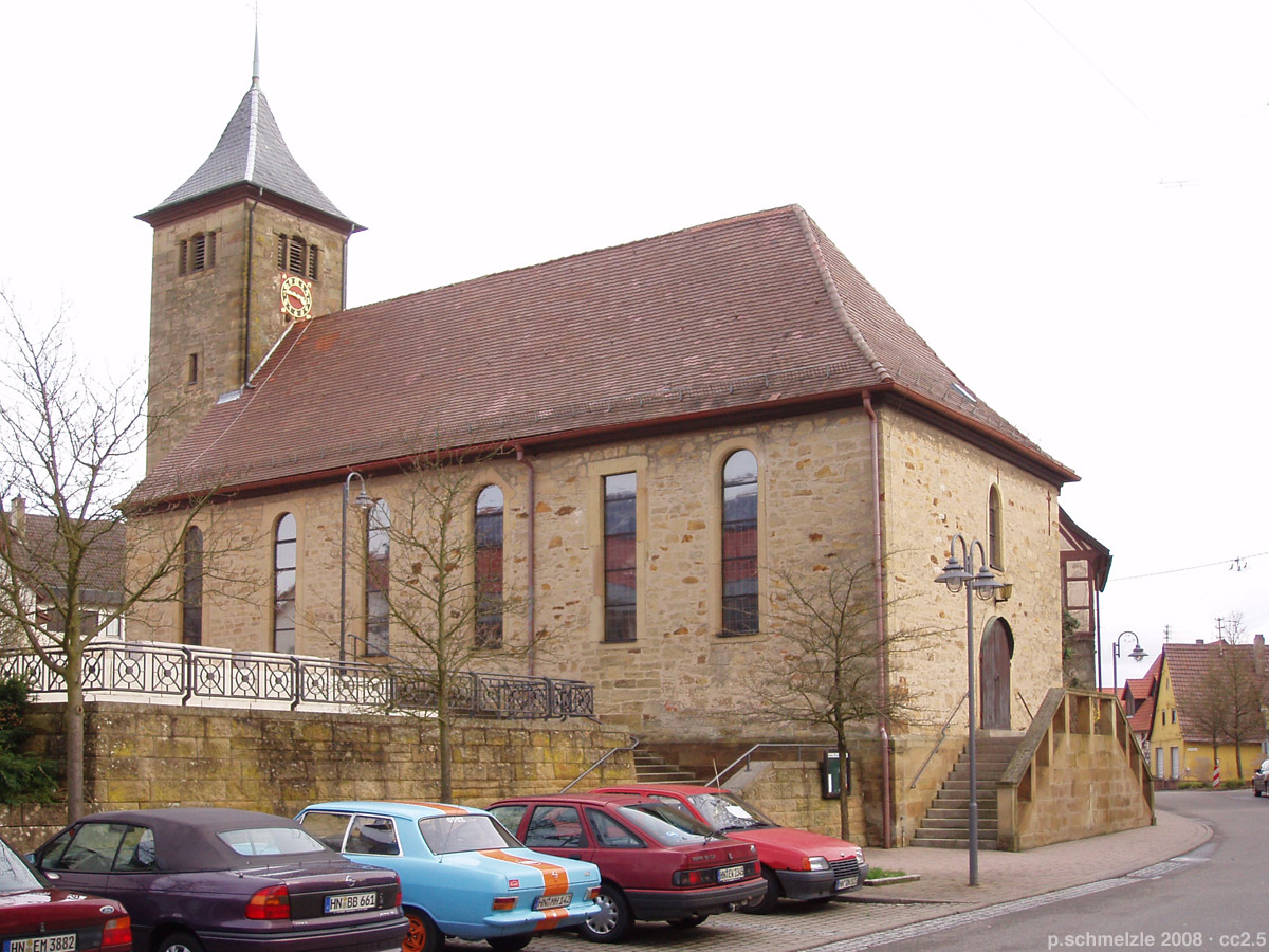 Evangelische Pfarrkirche in Zaberfeld-Ochsenburg